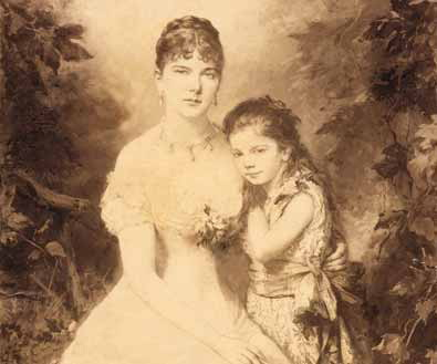 Партрэт сясьцёр Альжбеты і Алены Радзівіл, якіх раней памылкова ідэнтыфікавалі як Магдалену Радзівіл з дачкой Людвікай, на карціне невядомага мастака 1880 - 1890 гг. (выява з фондаў Нацыянальнага гістарычнага архіва Беларусі); герб "Лебедзь".